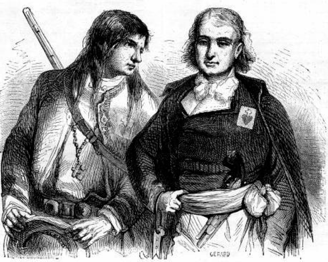 Illustration de Jean-Valentin Foulquier pour le roman historique de Jules Verne Le Comte de Chanteleine.